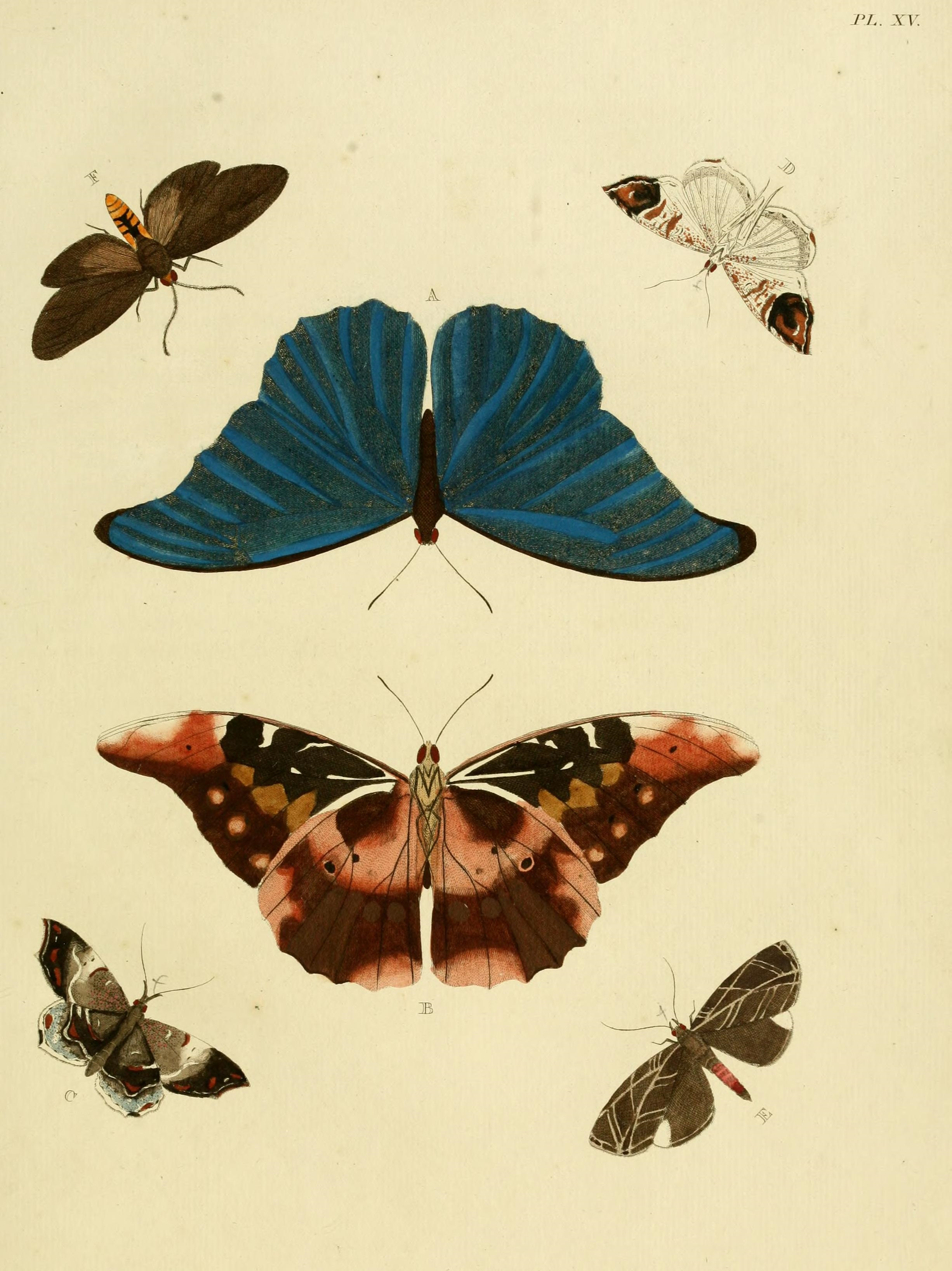 Plate XV A, B "(Papilio) Rhetenor" ( = Morpho rhetenor, see Funet ) Iconotype? C, D: "(Phalaena) Cynara" ( Macrodes cynara).Global Lepidoptera Names Index. E: "(Phalaena) Arné" ( = Eudmoe arne, see photo at Hétérocères de Guyane Française) Global Names Index.[1] F: "(Phalaena) Umber" ( = Pseudapistosia umber, see Funet), with photo. Also [2]Global Lepidoptera Names Index].